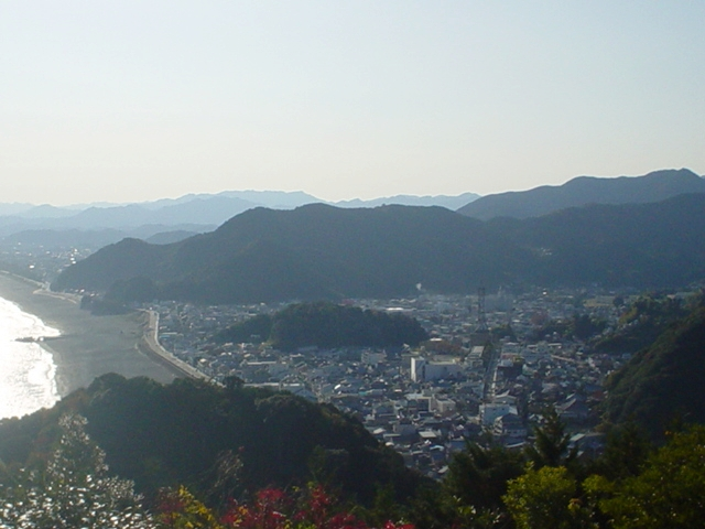 (三重県熊野市の松本峠 (熊野市)からみた熊野市。2007/12/2 投稿者が撮影 )